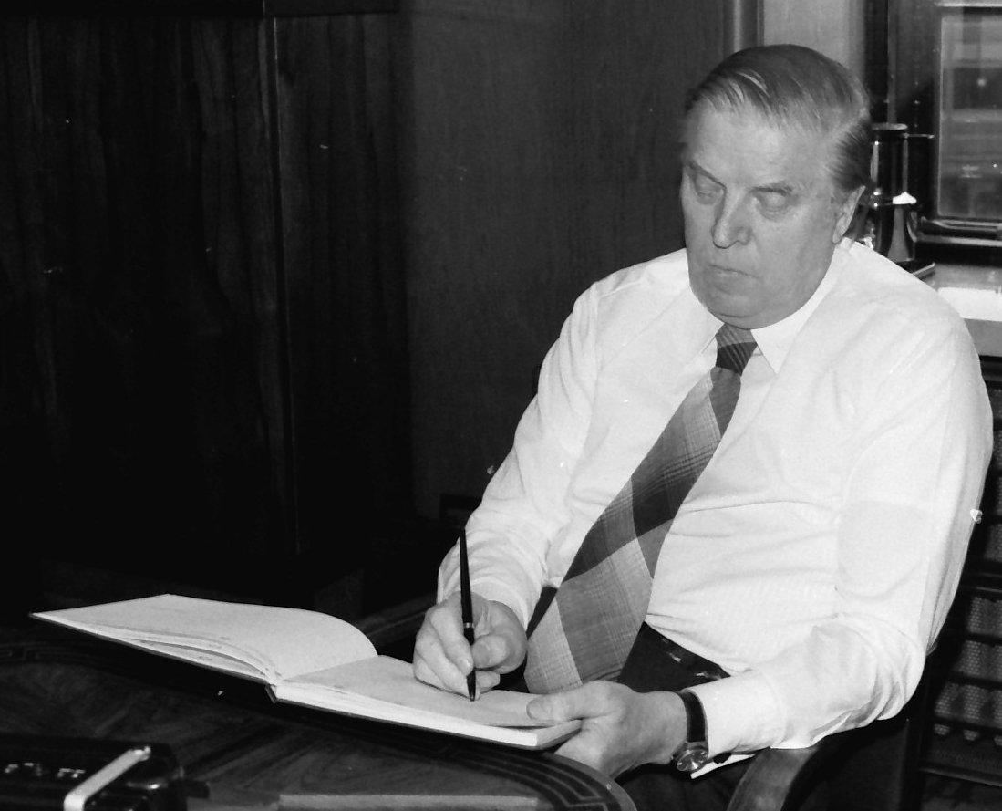 Johannes Virolainen eduskunnan puhemiehen huoneessa 1980